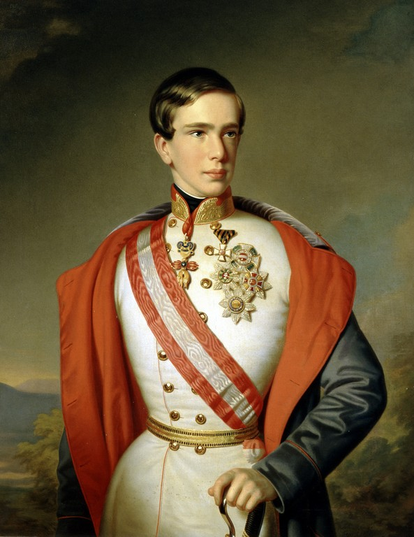 Johann Ranzi: Kaiser Franz Joseph in weißer Uniform mit Orden und dem Band des Maria Theresien Ordens, 1851, Ölgemälde; Bundesmobilienverwaltung